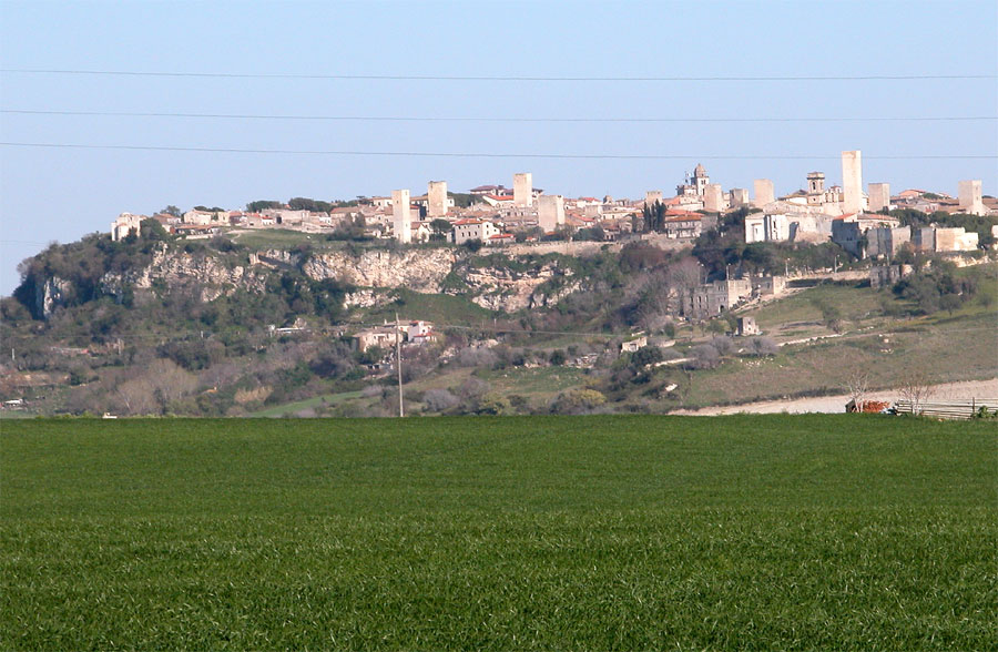 Tarquinia dalla via Aurelia